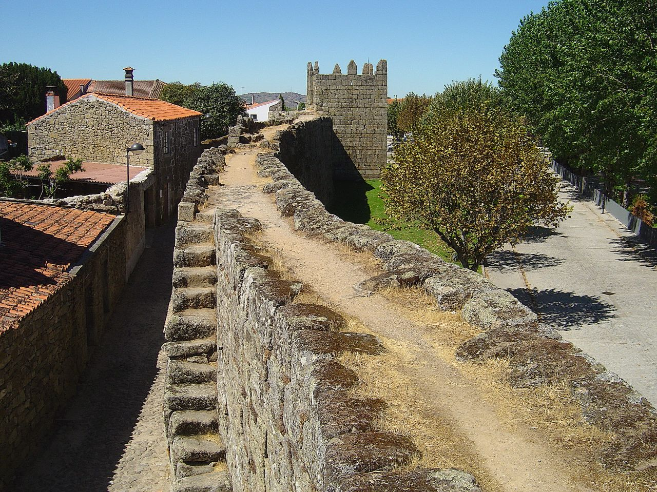 Estas muralhas cercam por completo a parte antiga da vila.